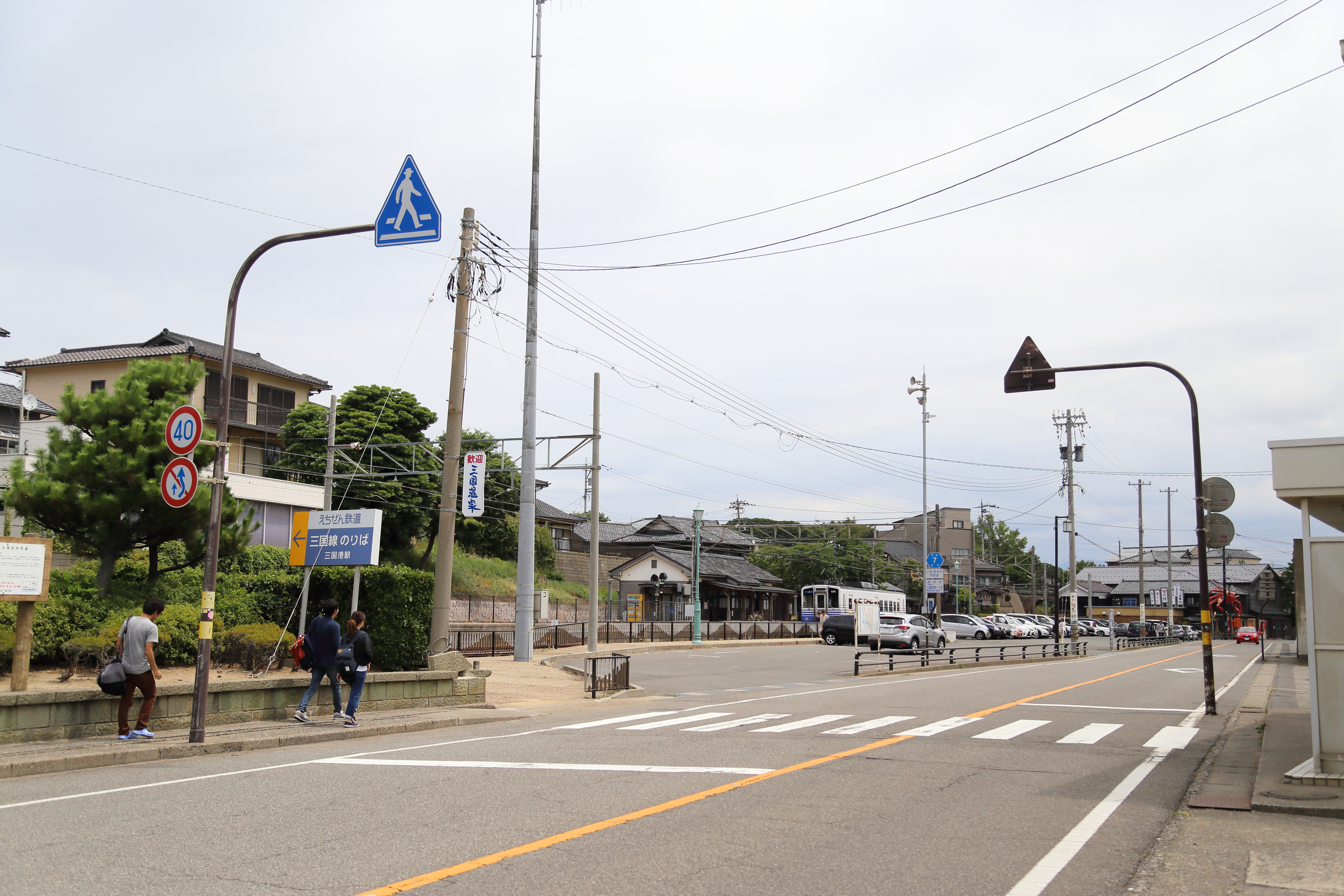 三国港駅南側、福井県道7号三国東尋坊芦原線から見た駅舎と駅駐車場。